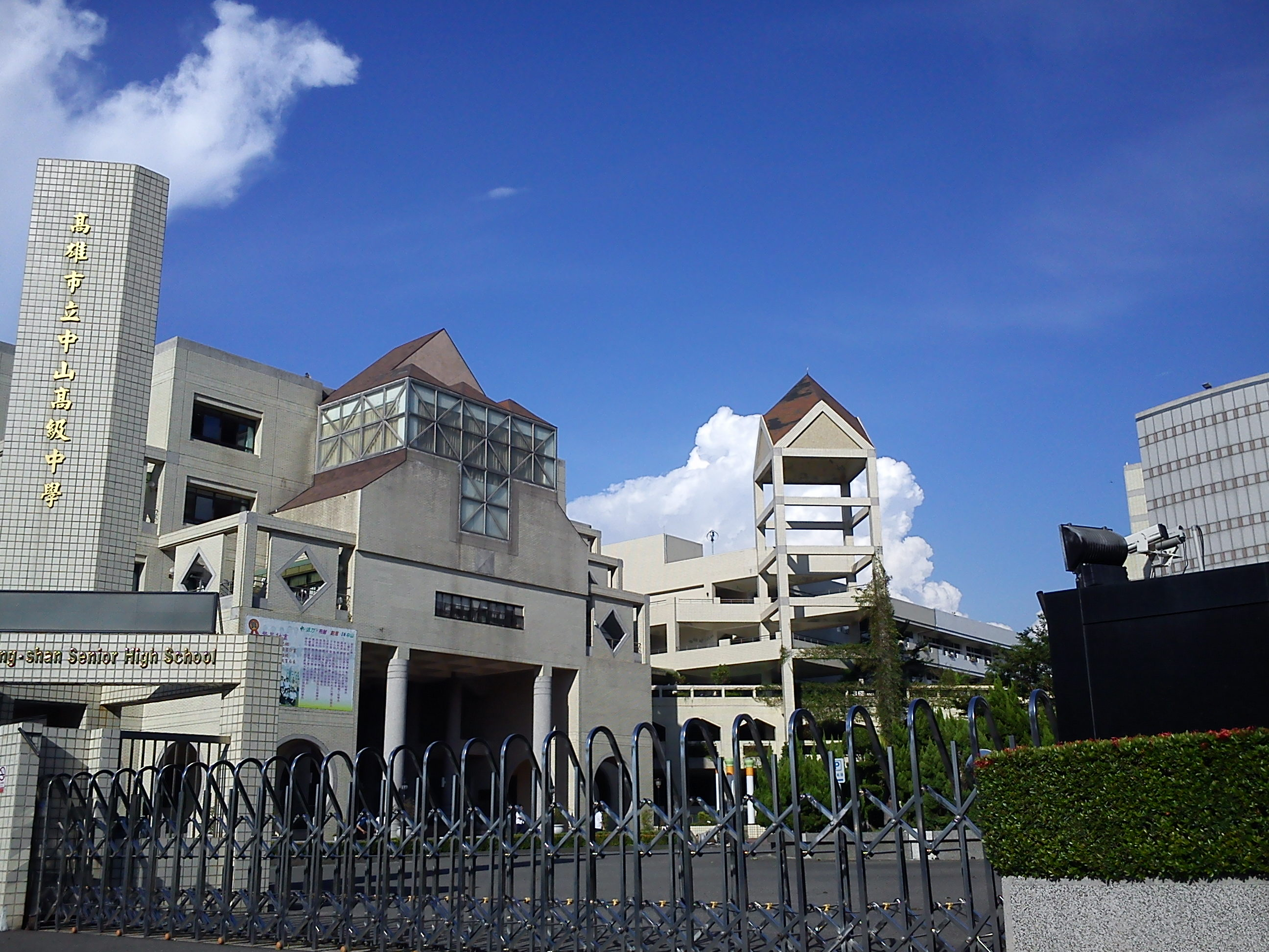 高雄中山高中。